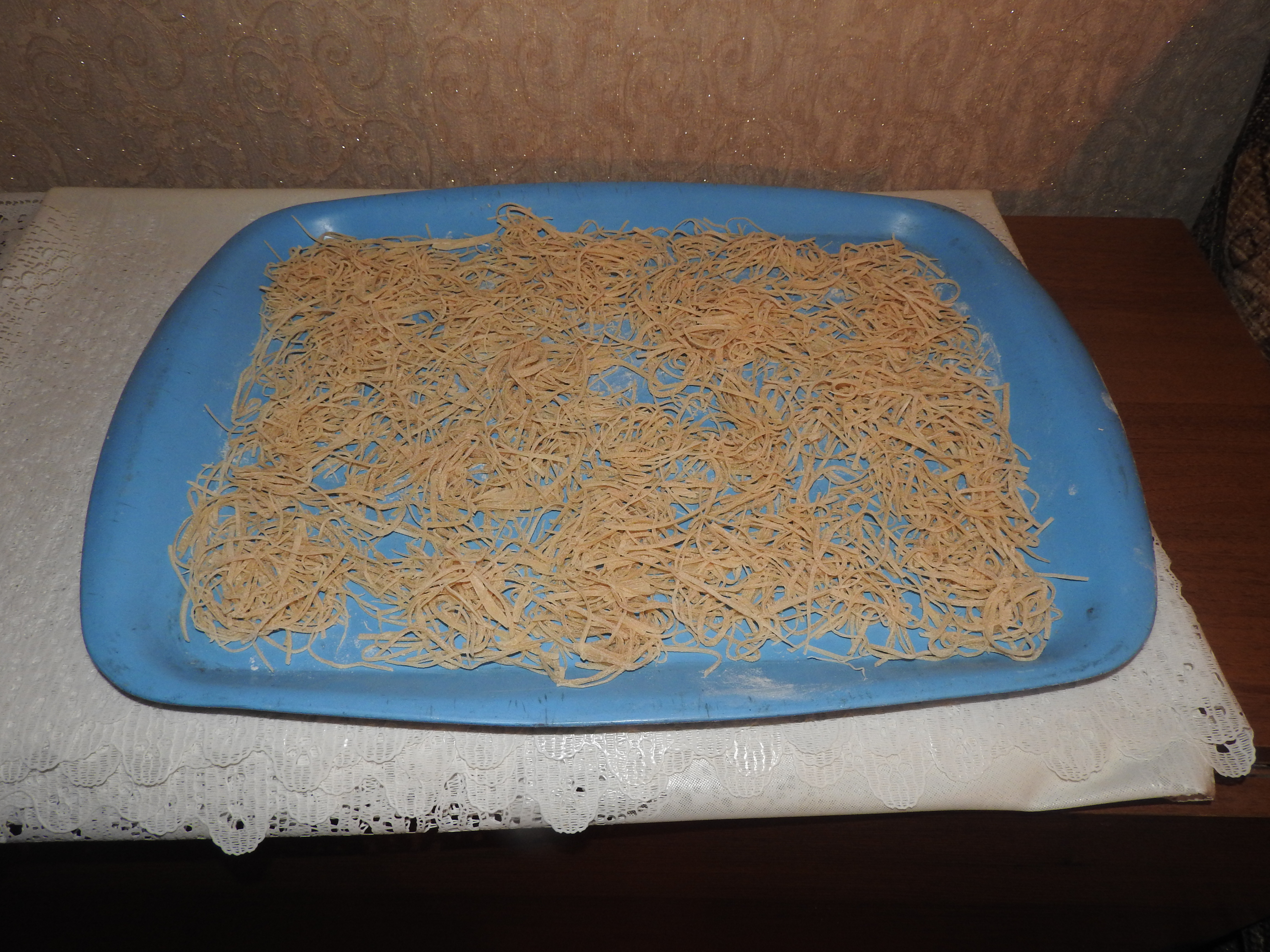 Башҡортса: Туралған һалма